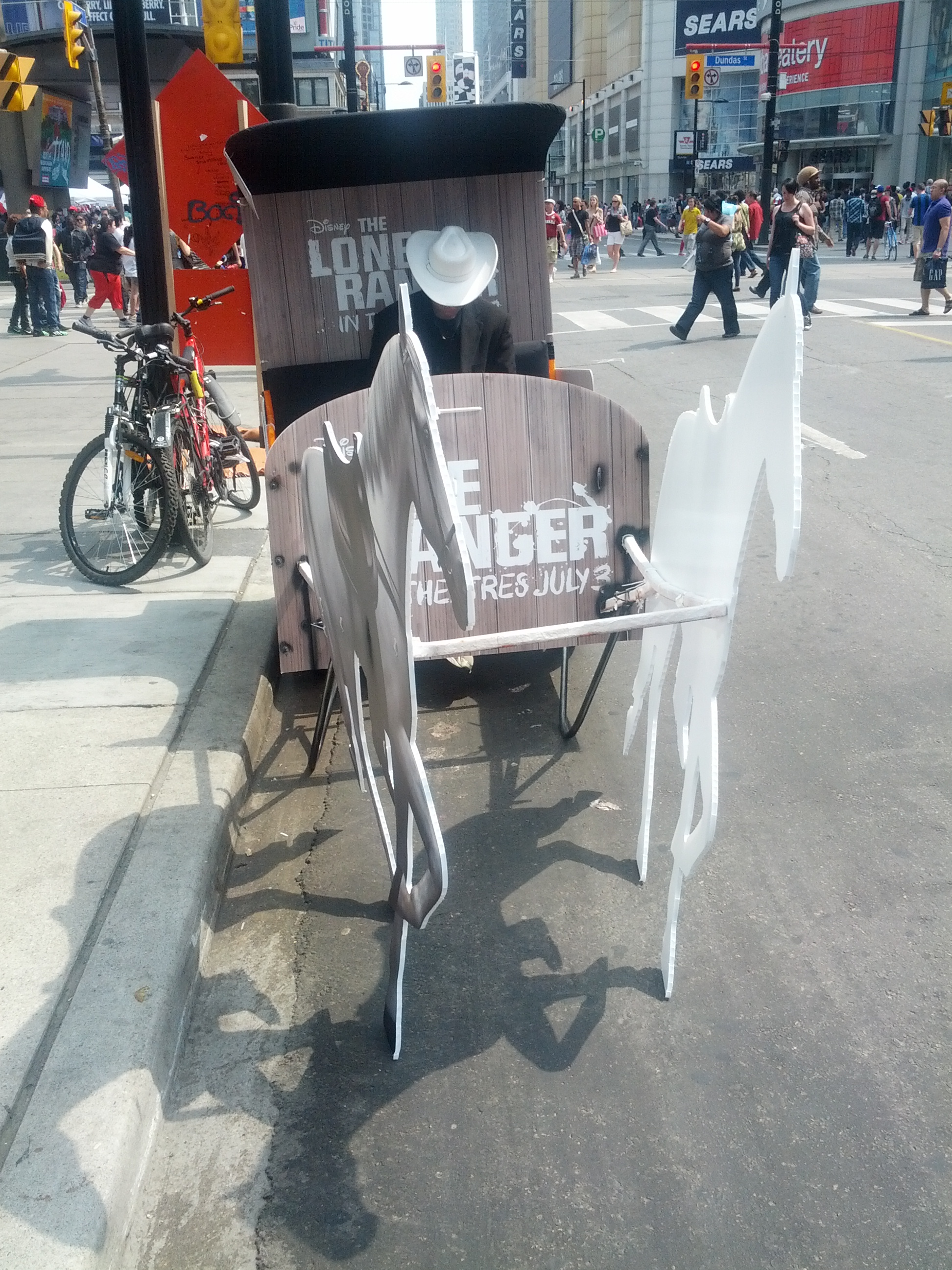 Carroça com tração humana em Toronto, Ontario, Canadá.